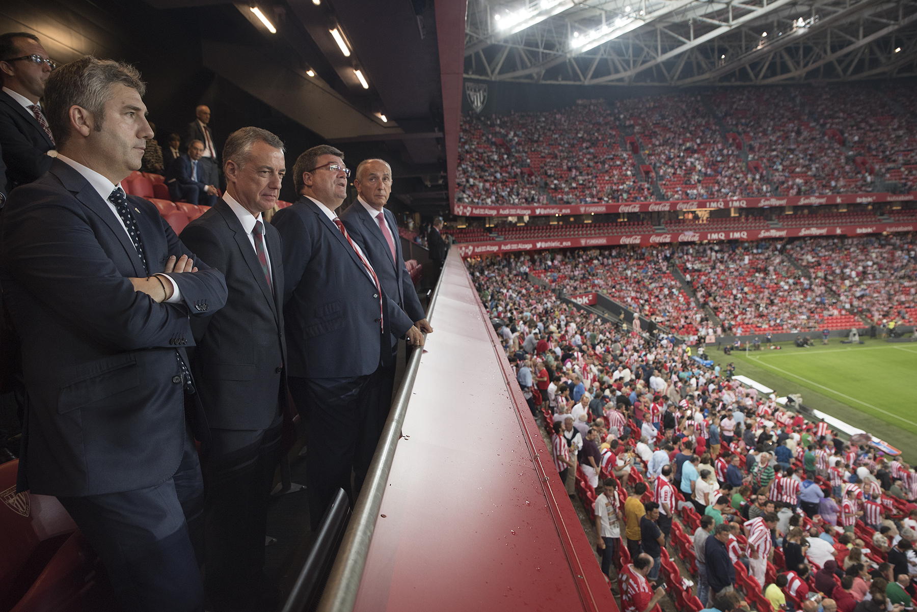 El lehendakari asiste al partido "Athletic Club - FC Barcelona" en San Mamés